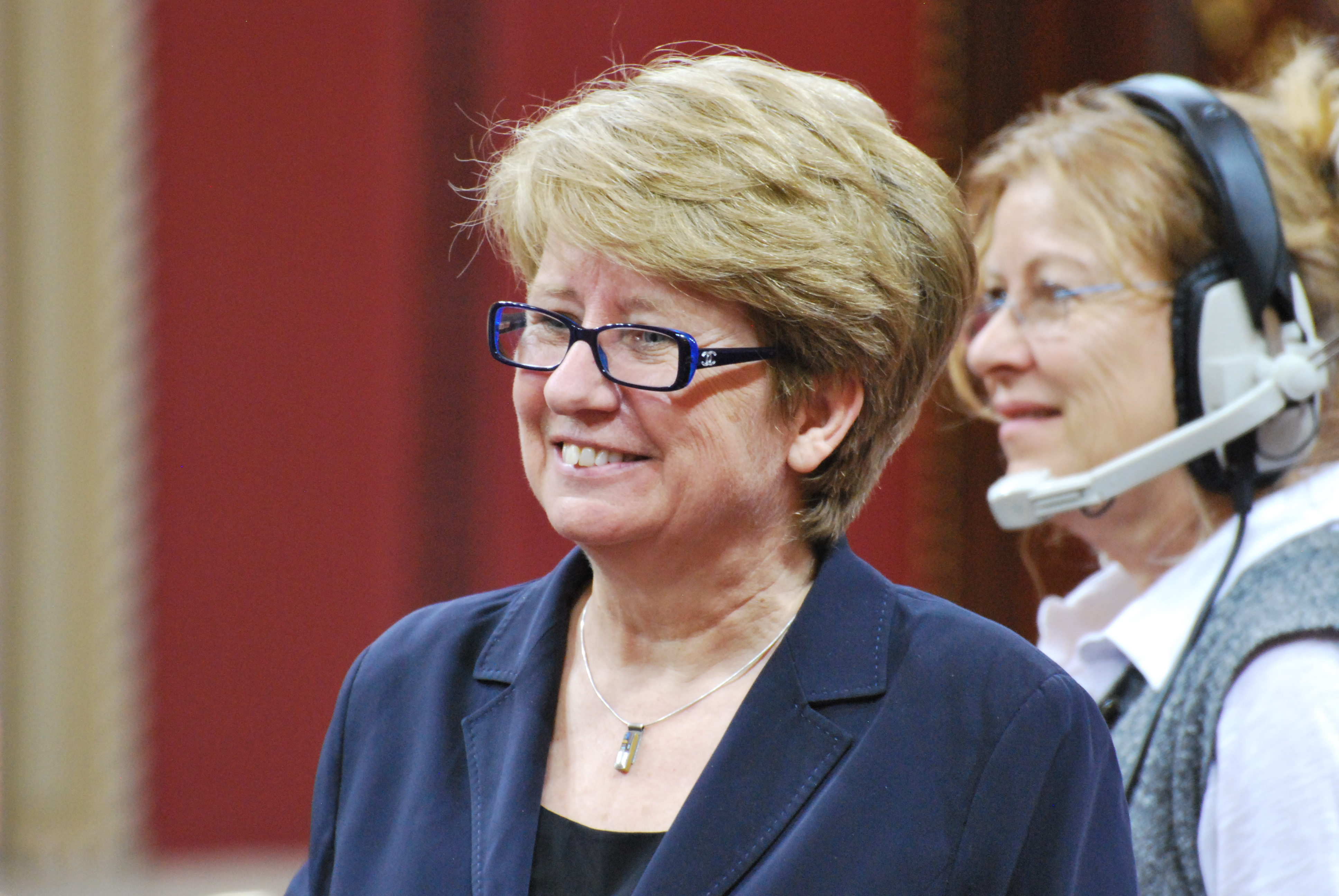 Cérémonie de remise de l'ordre national du Québec 2013. Agnès Maltais